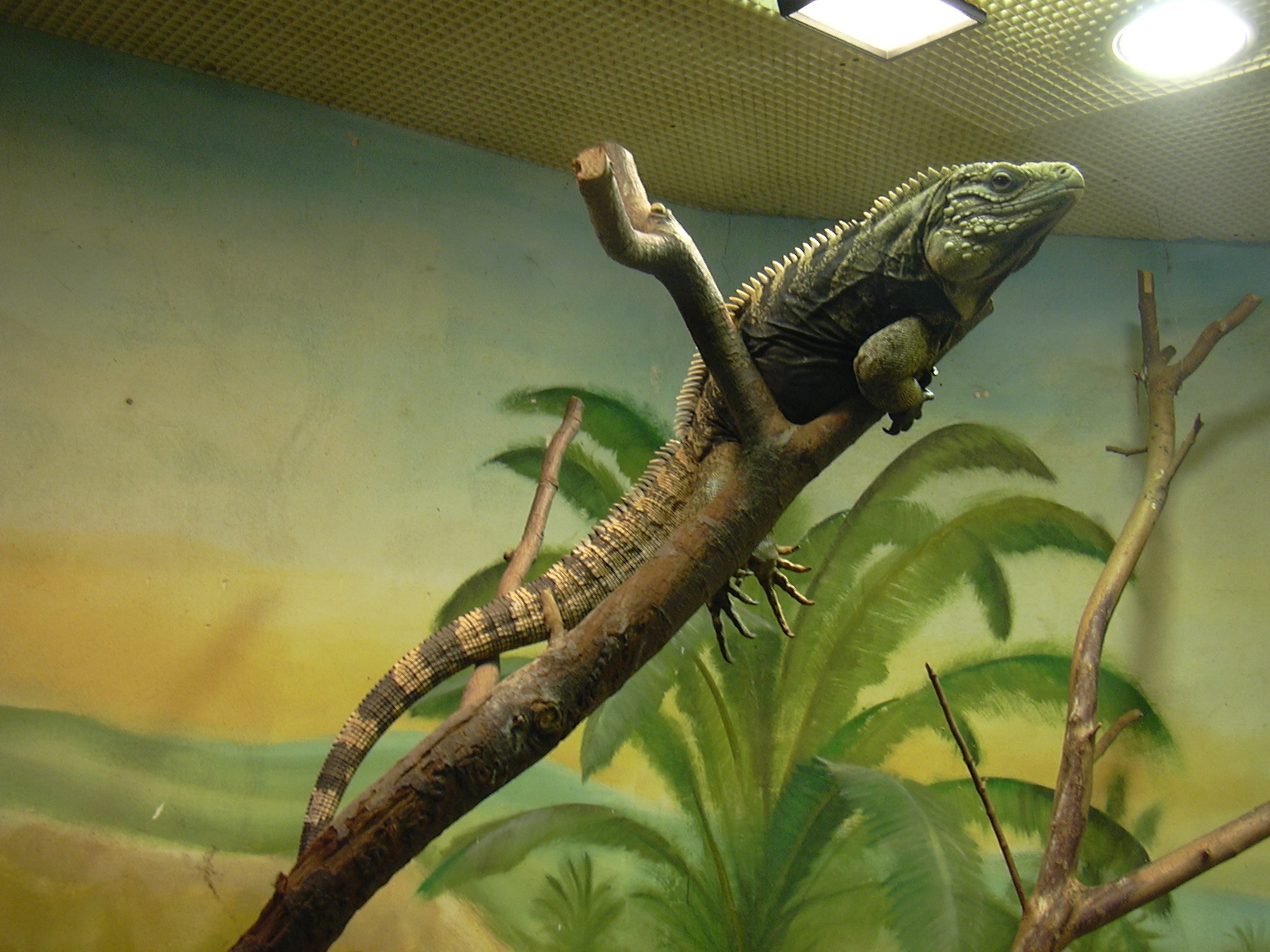 Cuban Iguana (Cyclura nubila nubila) in Zoo Ústí nad Labem, Czechia